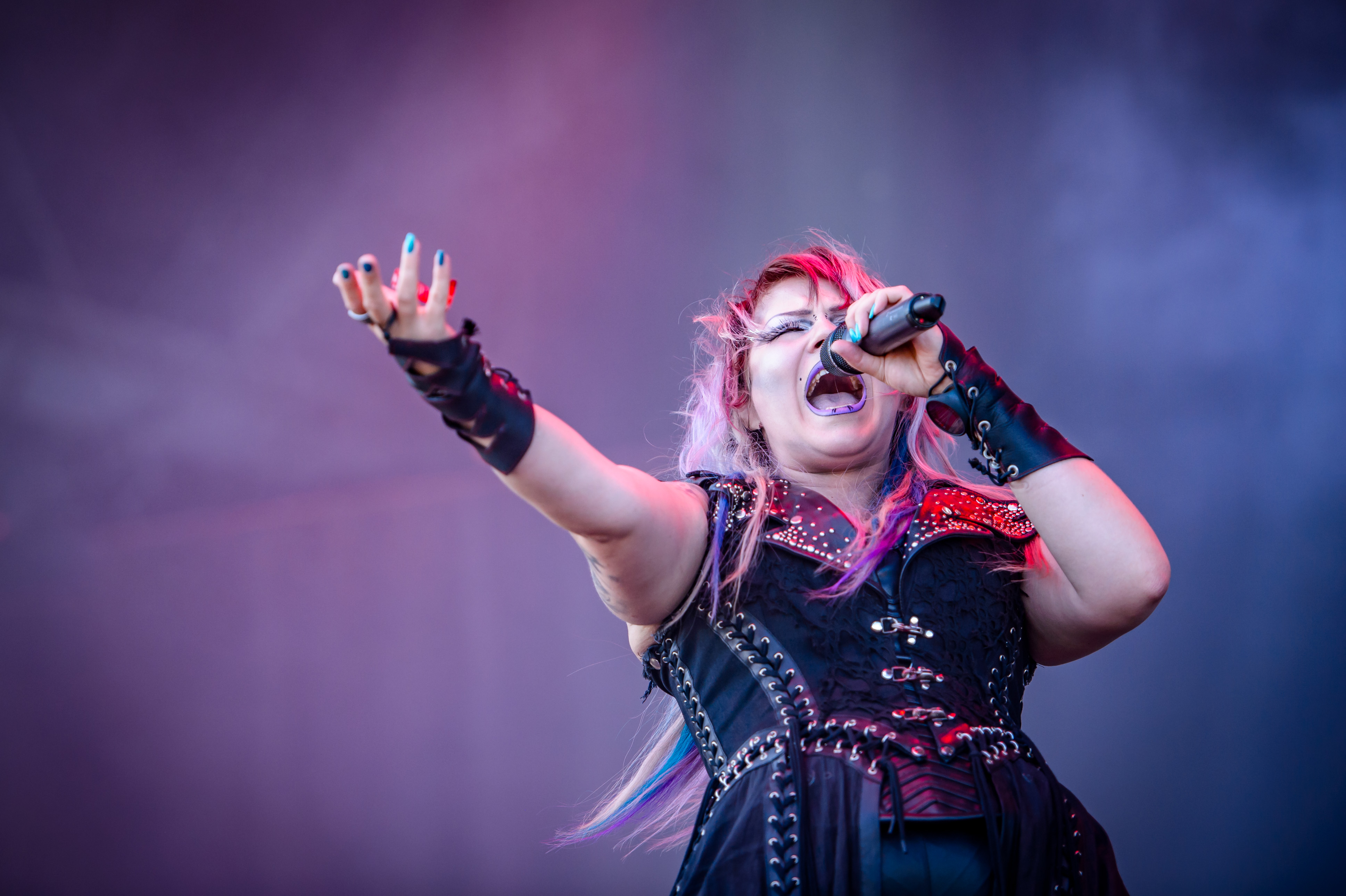 'Summer Breeze Festival 2017; Dinkelsbühl': 'Battle Beast'